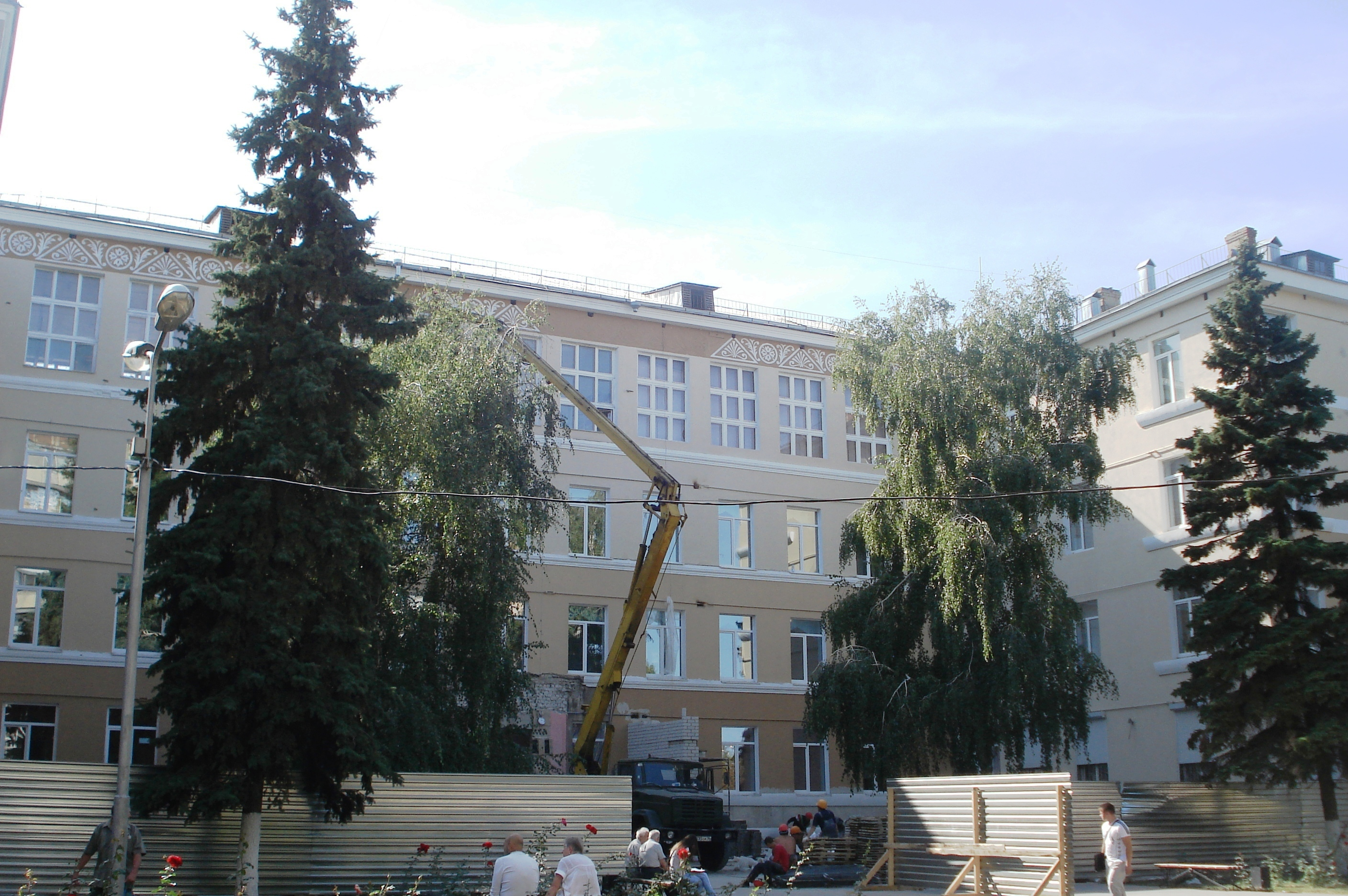 Реставрация фасада Басовской гимназии в Воронеже